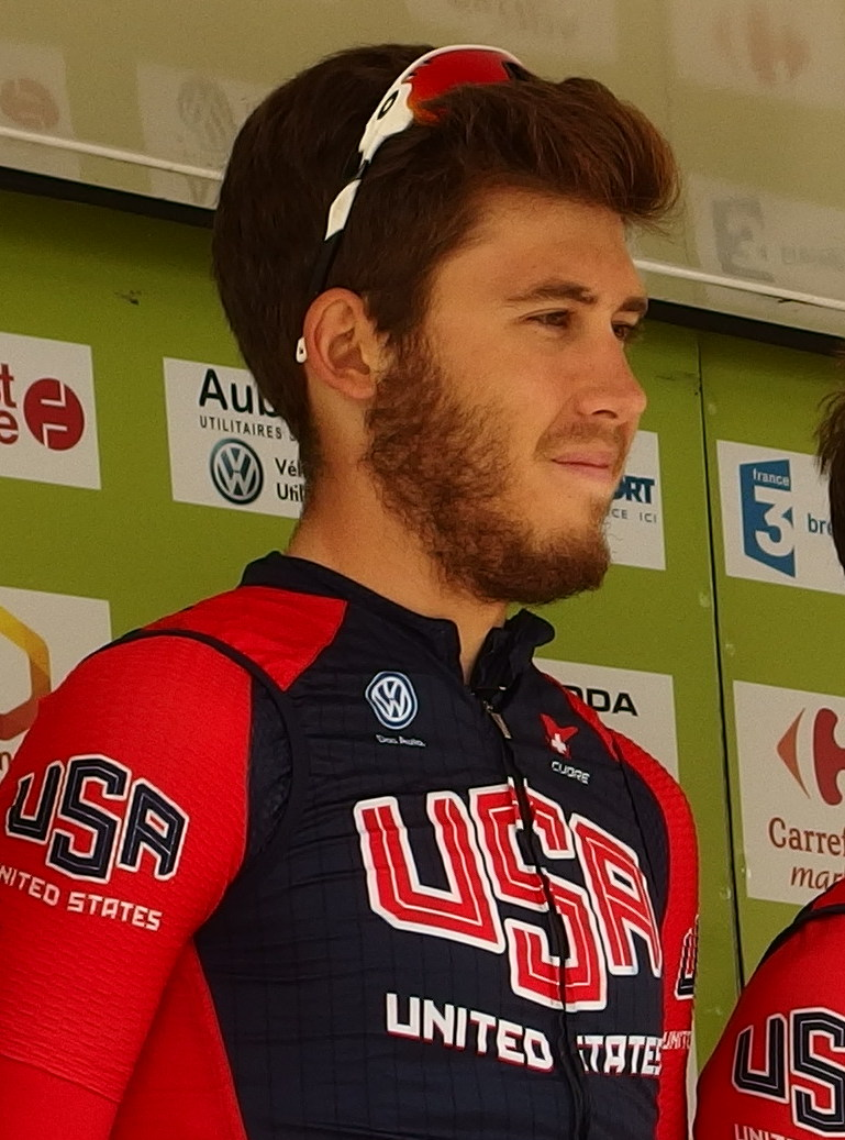 Tour de Bretagne 2015 - Présentation des équipes au départ de la troisième étape à Baud - Équipe nationale des États-Unis Depicted person: Daniel Eaton